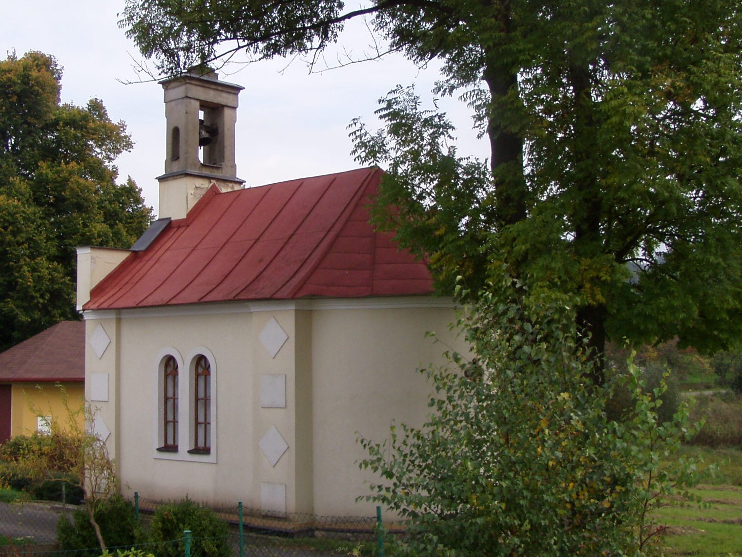 Kostel Panny Marie (Tis)